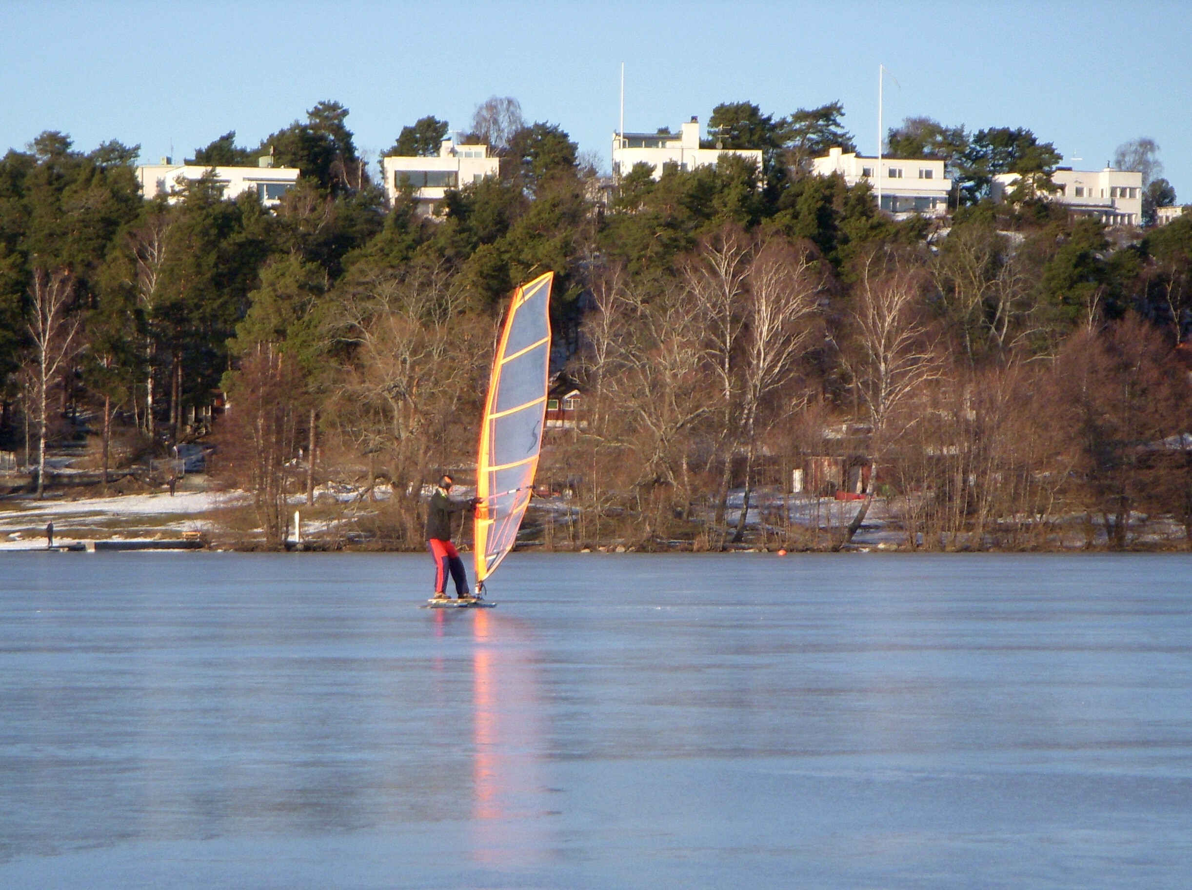 Isseglare med Södra Ängby i bakgrunden, februari 2011